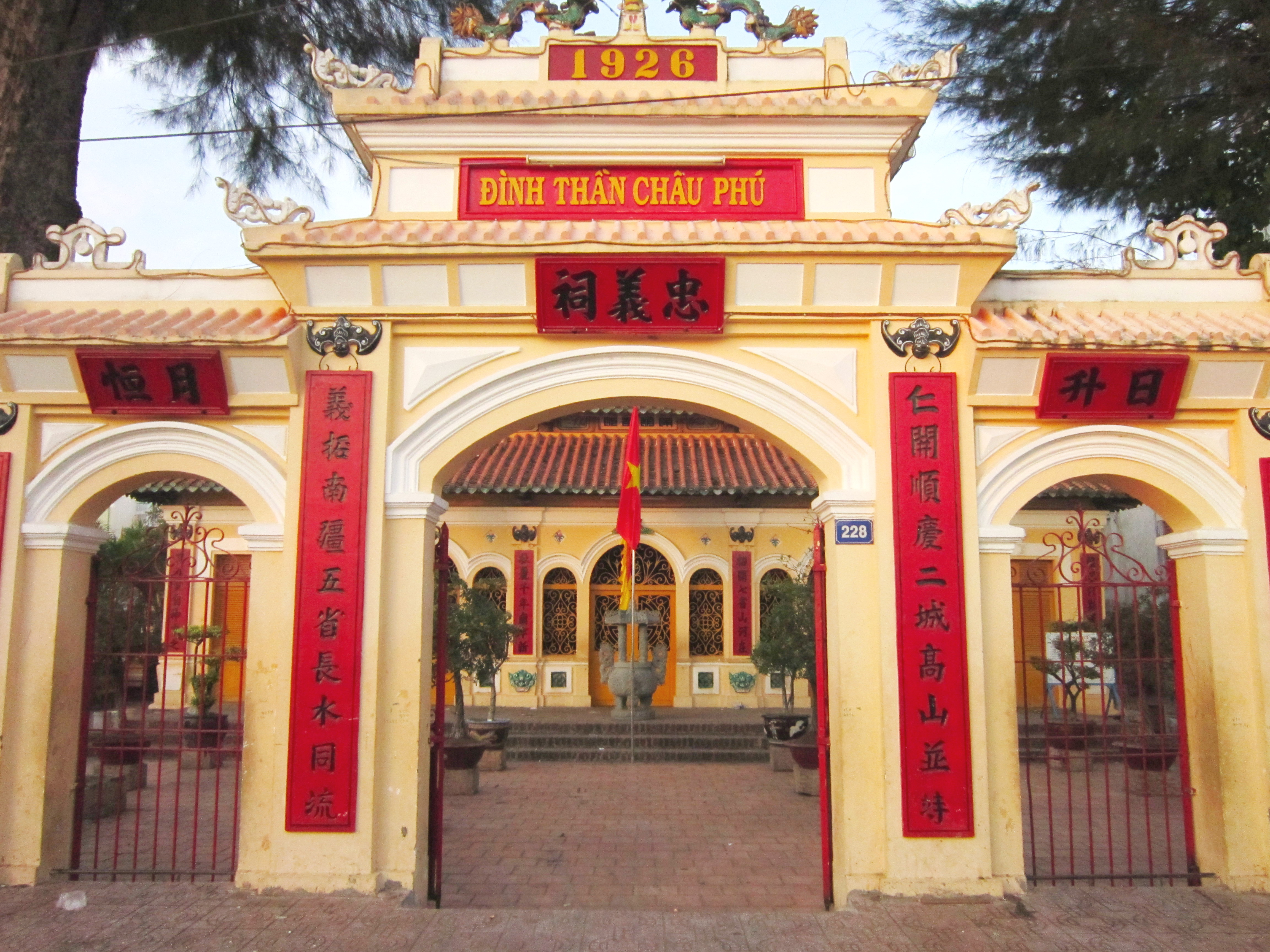 Đình Châu Phú tại chợ Châu Đốc (An Giang, Việt Nam). Đình thờ tướng Nguyễn Hữu Cảnh (1650-1700).